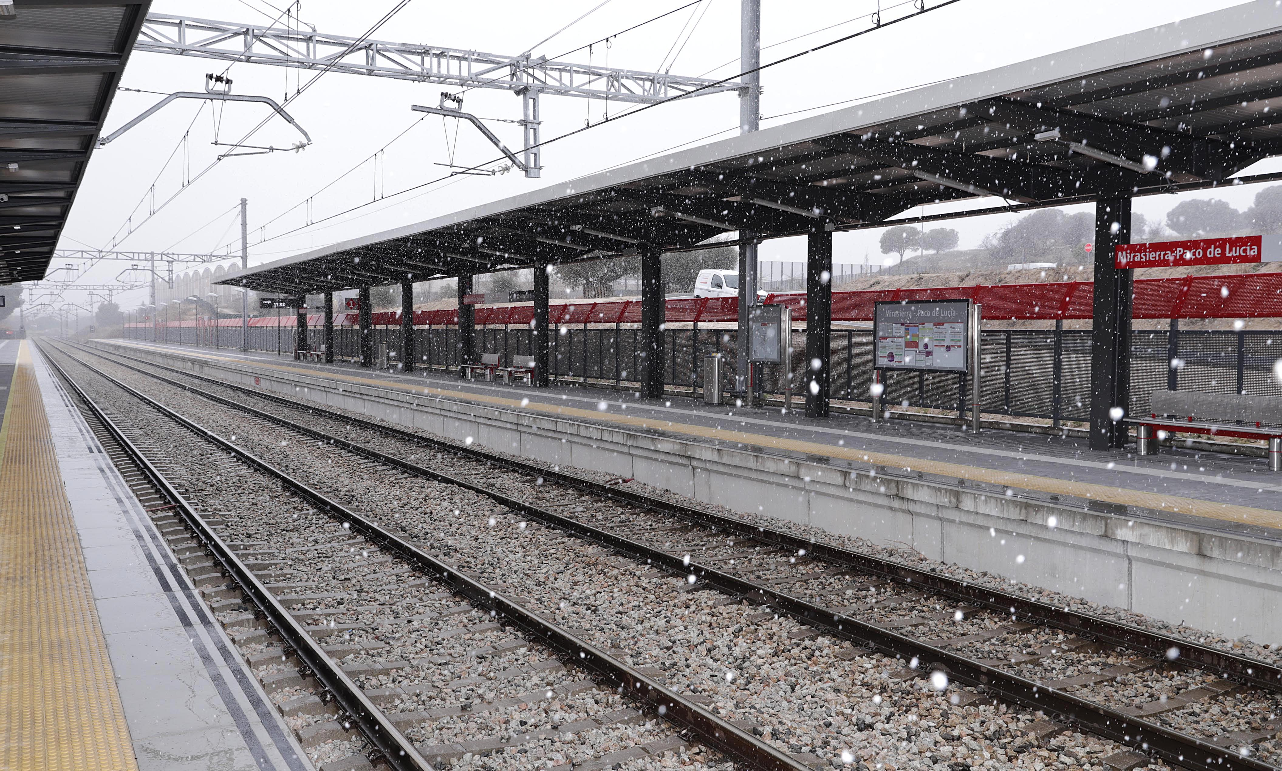 La estación de Cercanías de Mirasierra-Paco de Lucía conecta con la línea 9 de Metro de Madrid.